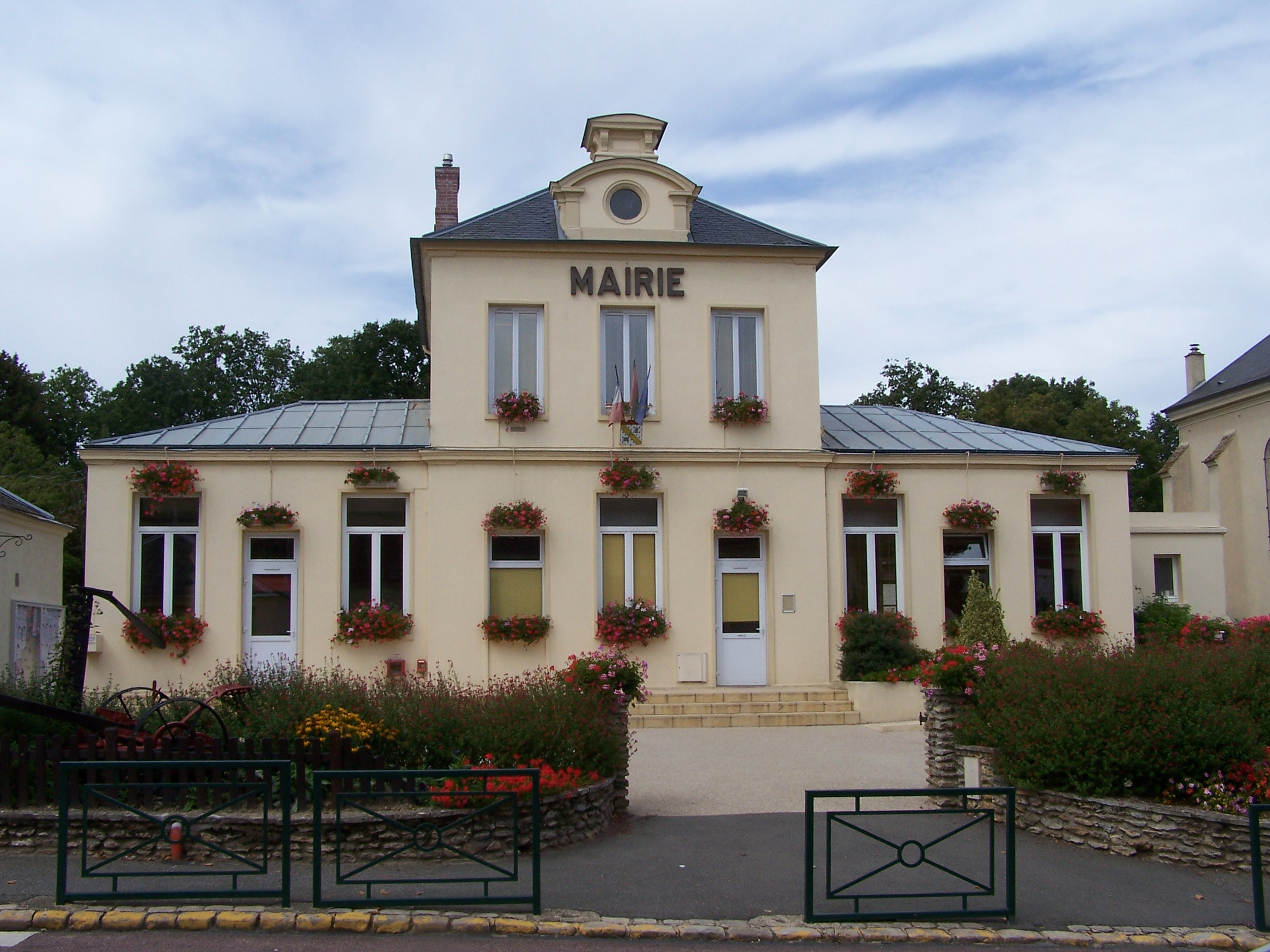 Hôtel de ville de La Queue-lez-Yvelines (Yvelines, France). Photo personnelle. Town hall of La Queue-lez-Yvelines (Yvelines, France). Personal photo. Auteur/Author : Henry Salomé